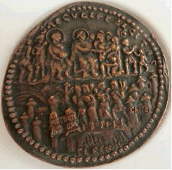 Ein Duplikat des Lyoner Bleimedaillons, das in unregelmäßigen Abständen von der Stadt Mainz für die Verdienste um die Kulturgeschichte der Stadt verliehen wird.